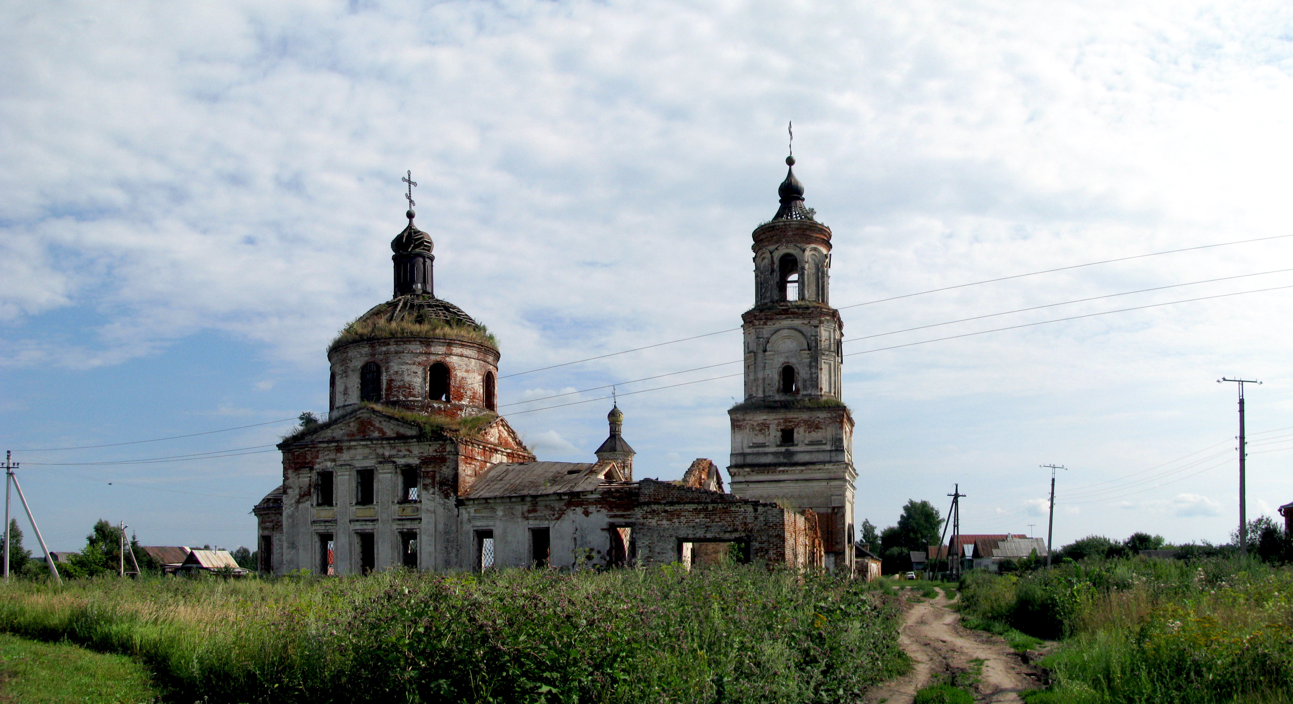 Заречное Арзамасский район церковь